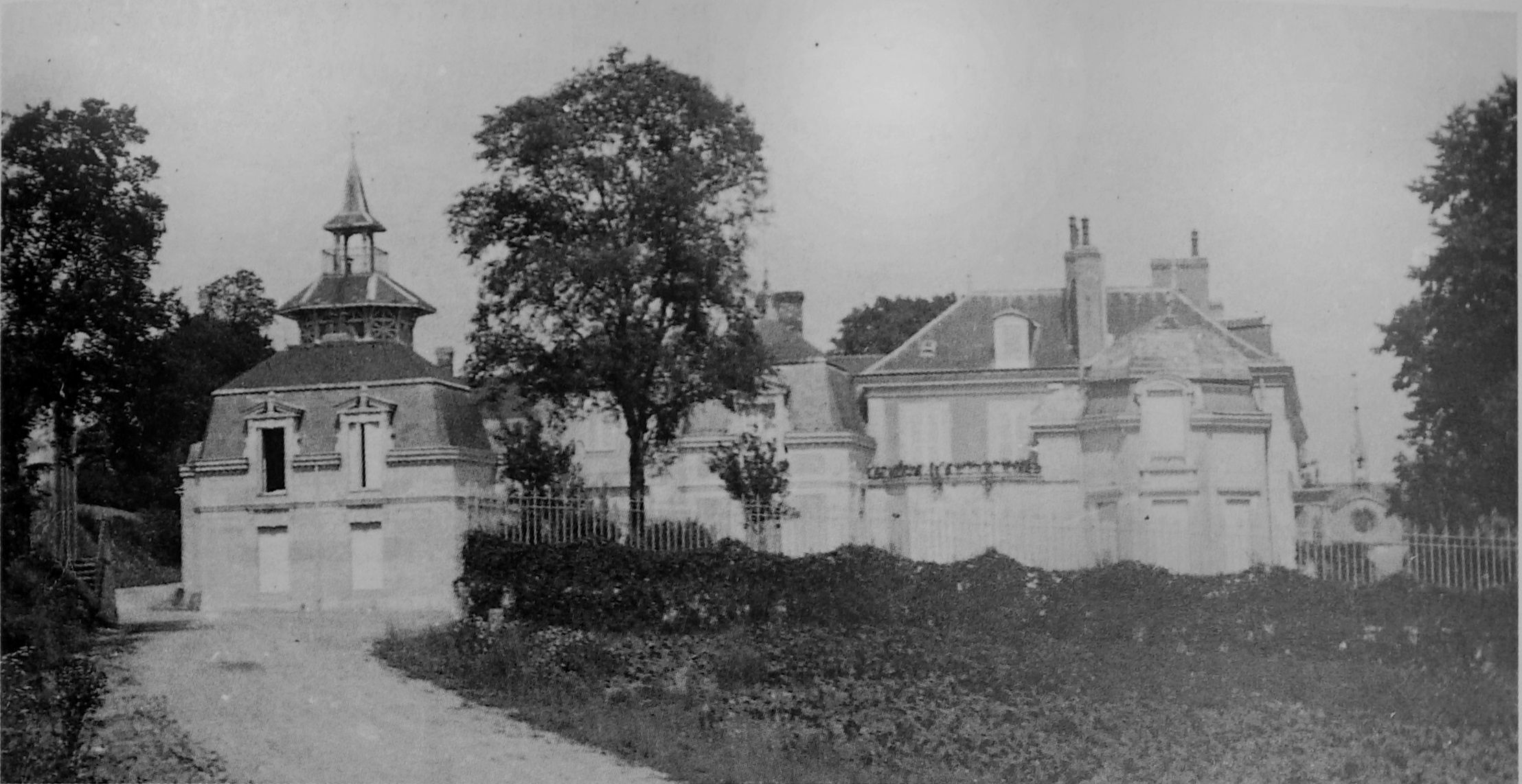 vue du château de la famille Ruinart à Brimont.